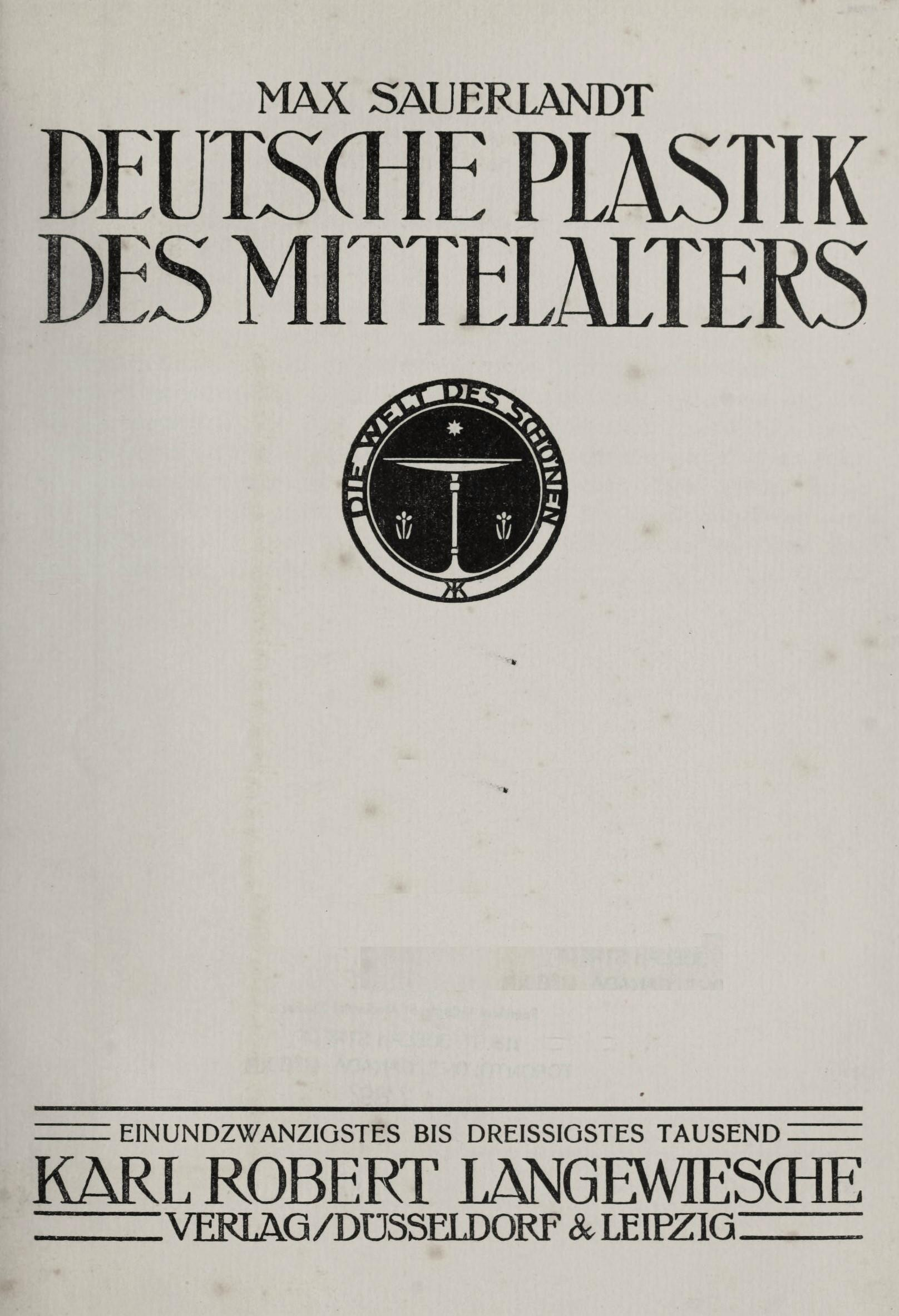 Max Sauerlandt: Deutsche Plastik des Mittelalters, Karl Robert Langewiesche Verlag, Düsseldorf & Leipzig, 1909.